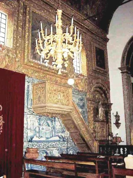 Convento de São Gonçalo, freguesia da Sé, cidade e concelho de Angra do Heroísmo, ilha Terceira, Açores.